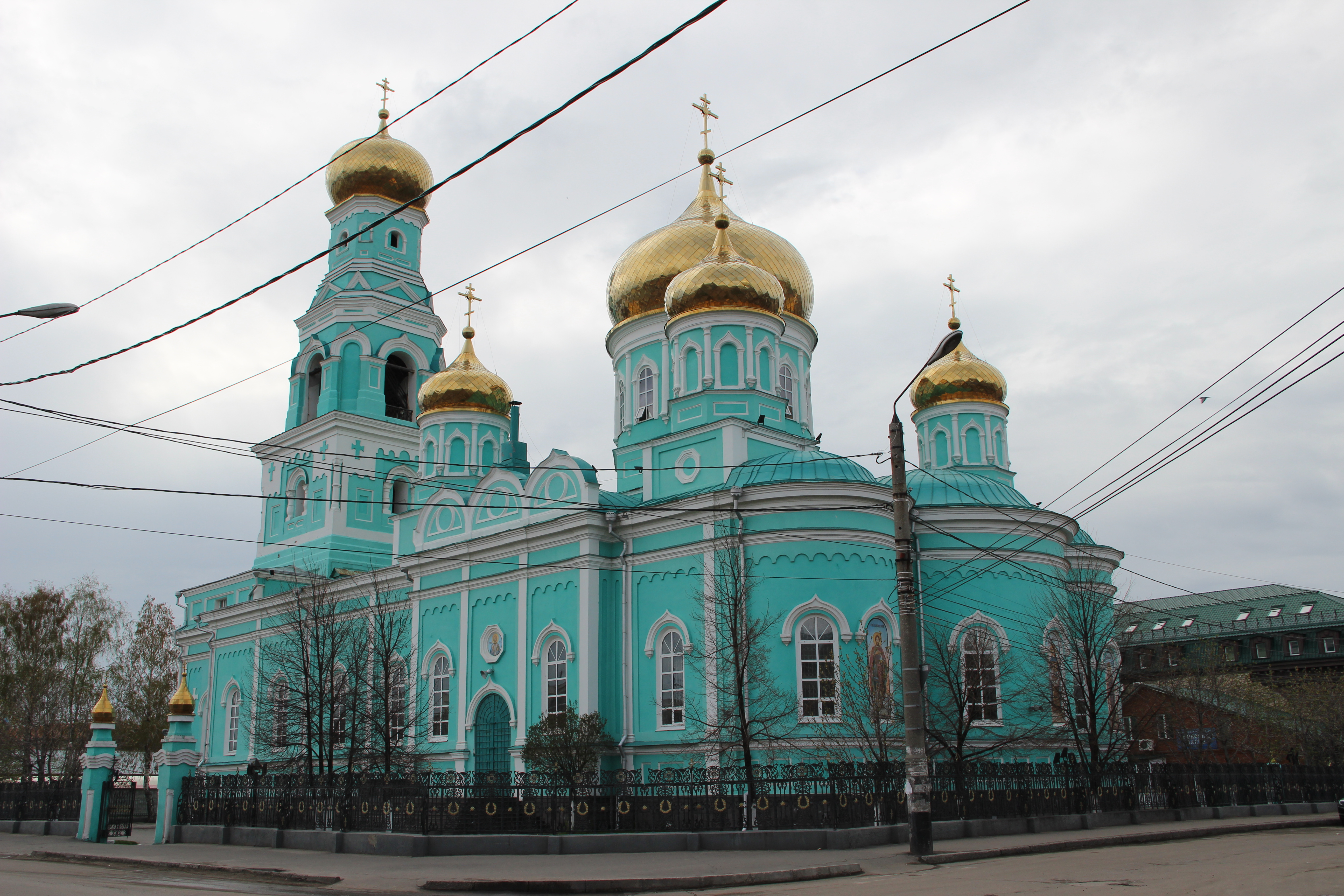 Собор Казанской Божьей Матери с пределом Александра Невского: переулок Достоевского, 17, Сызрань, Самарская область